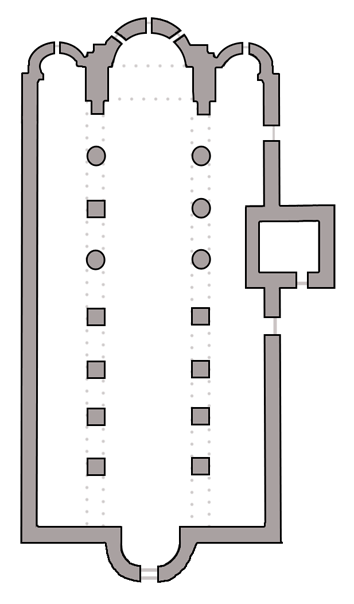 Pianta della Pieve di San Giorgio di Valpolicella Tratta da Wart Arslan, L'architettura romanica veronese, 1939